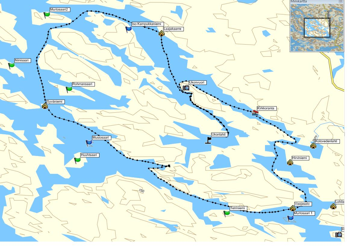 Navigaattoriin tallennettu melontareissu, kuvaruutukaappaus